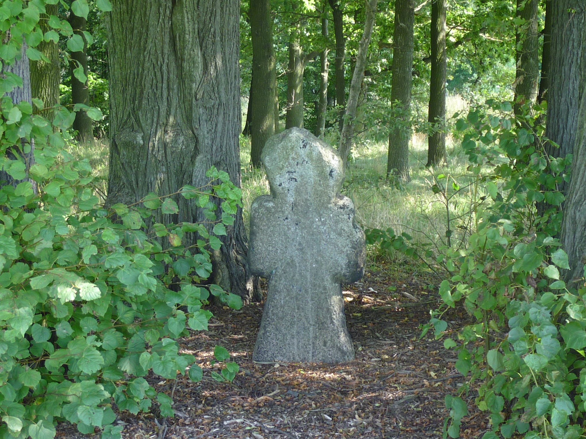 Steinkreuz in Litschen, Gemeinde Lohsa in Sachsen Hornjoserbsce: Kamjentny křiž w Złyčinje (gmejna Łaz)